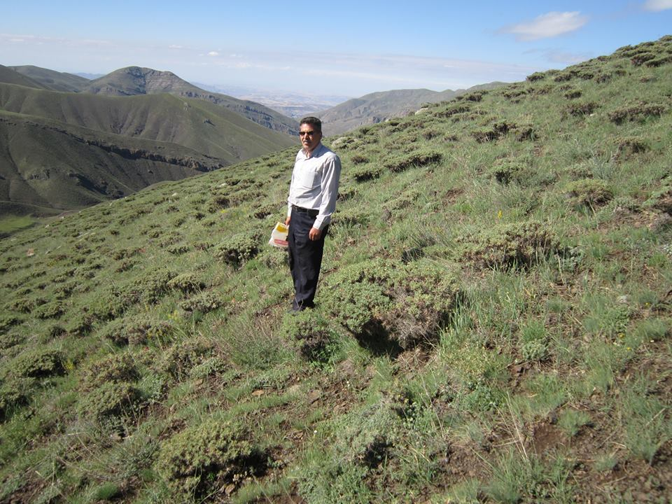 پوشش گياهي گون در كوههاي مجاور روستاي خان كندي گرمي